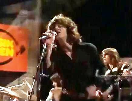 koncert Spooky Tooth w roku 1977